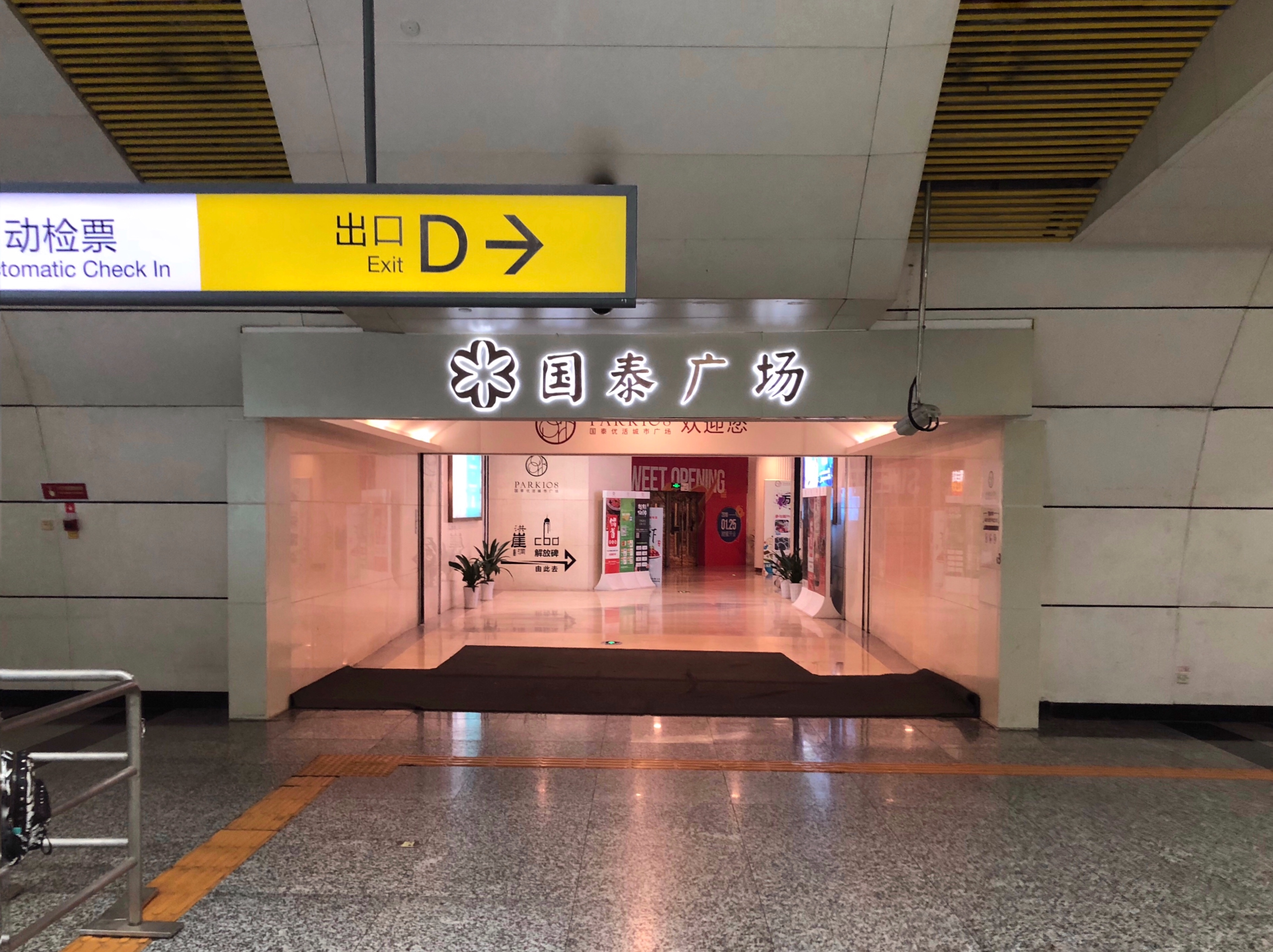 中文（中国大陆）: 2号线临江门站国泰广场连接口